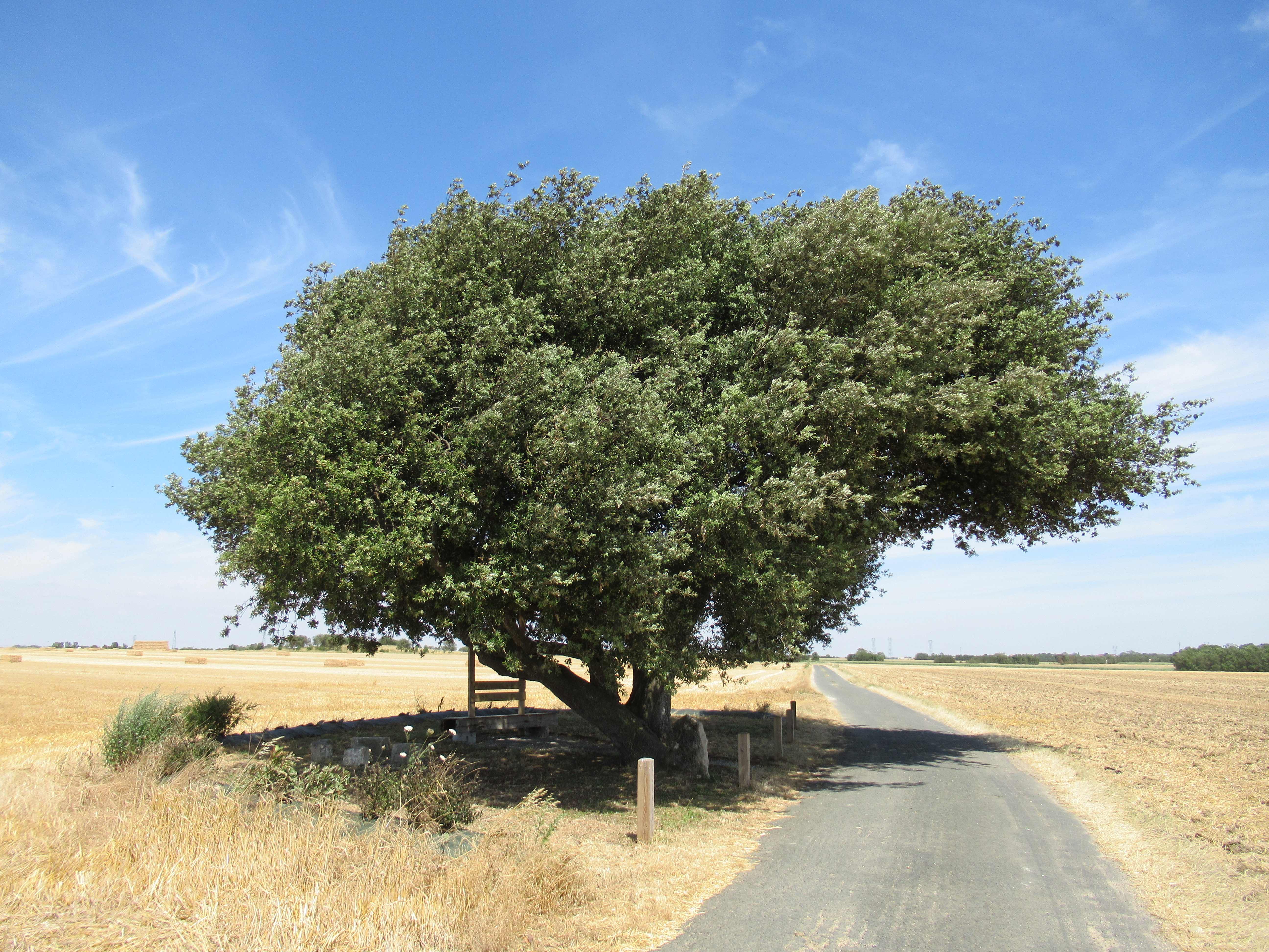 Chêne vert centenaire, classé arbre remarquable (depuis le 06/07/2016) à Clavette (17) France.